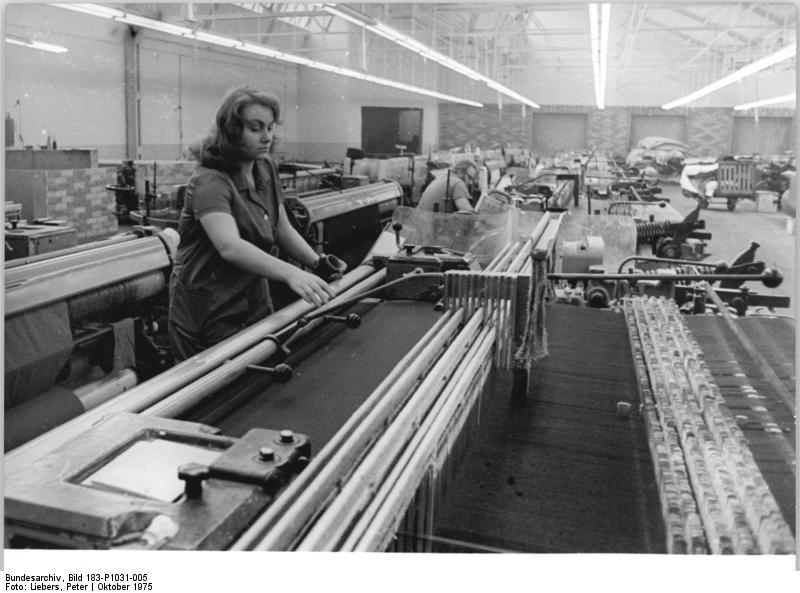 ADN-ZB-Liebers-31.10.75-Bez. Gera: Zwölf hochleistungsfähige Greiferwebautomaten aus der Sowjetunion überwacht Monika Ciesielski im VEB Greika in Greiz. Die Automaten, die als Jugendobjekt "Juri Gagarin" übergeben wurden, ermöglichen, daß eine Weberin zwölf statt bisher sechs Maschinen bedient. Damit wurden die erforderlichen Arbeitskräfte für ein dreischichtiges Auslasten der Webautomaten freigesetzt. Die Produktion steigt dadurch auf das Vierfache.